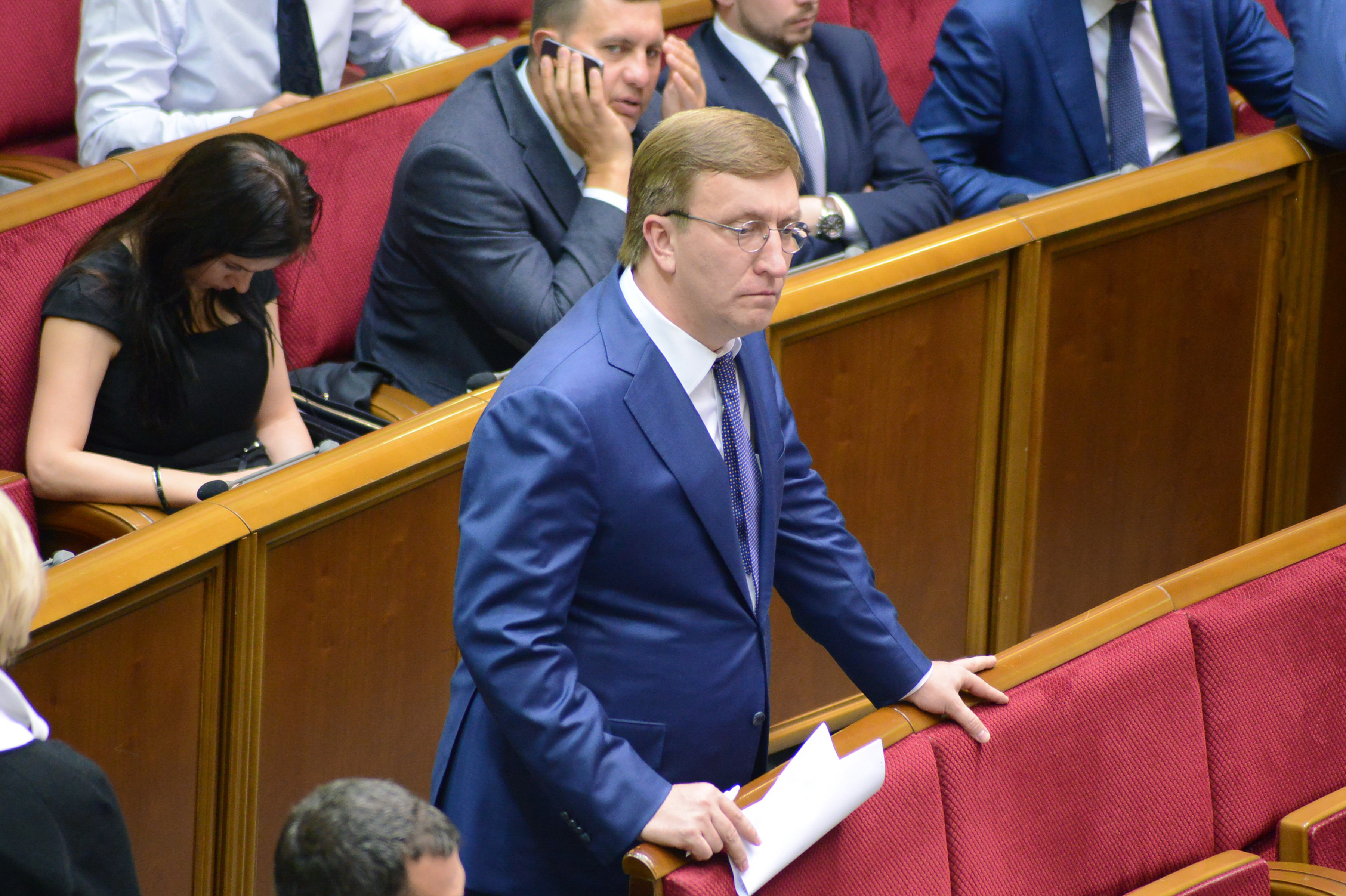 БУХАРЄВ ВЛАДИСЛАВ-ПАРЛАМЕНТ